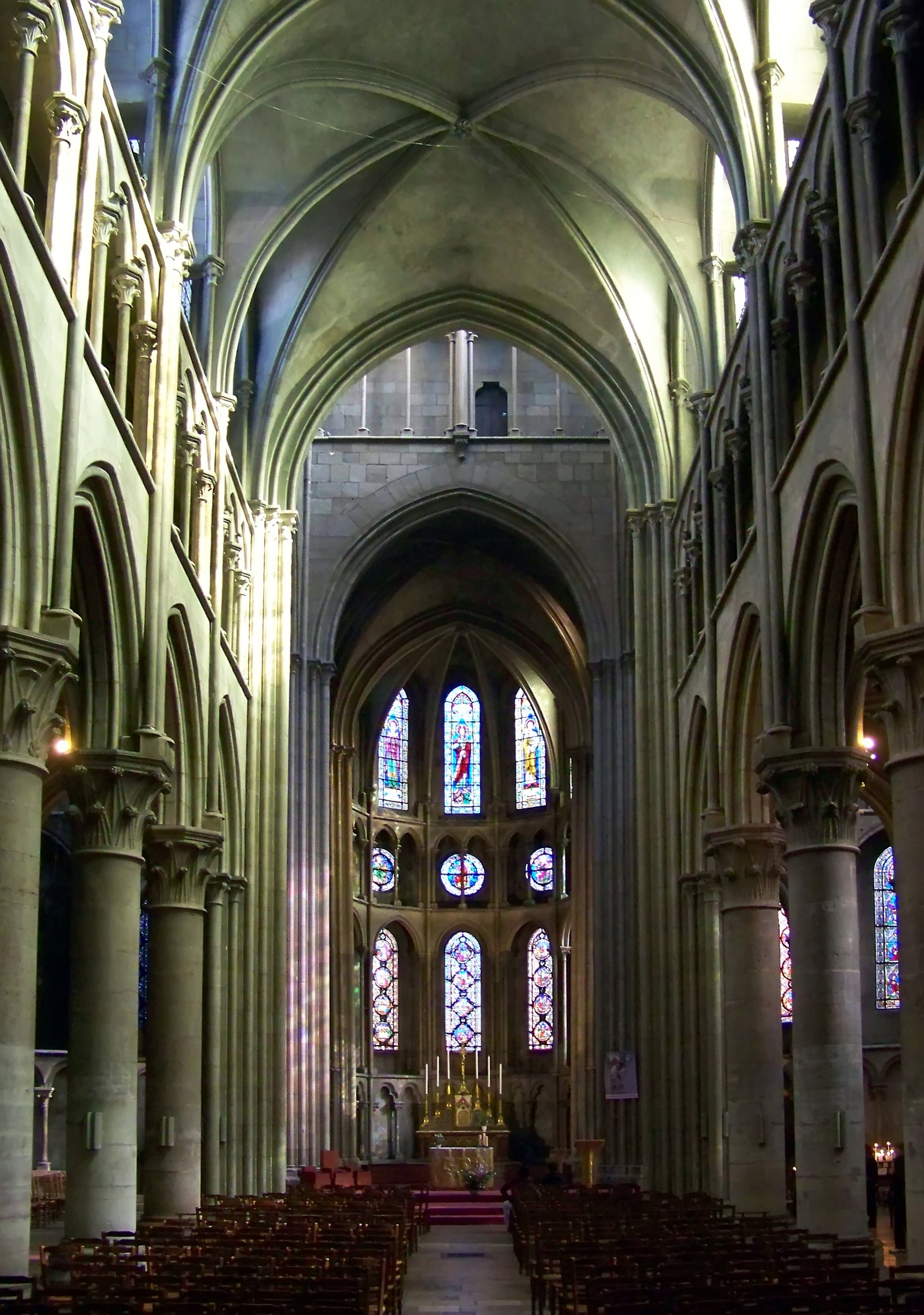 Dijon, église Notre-Dame